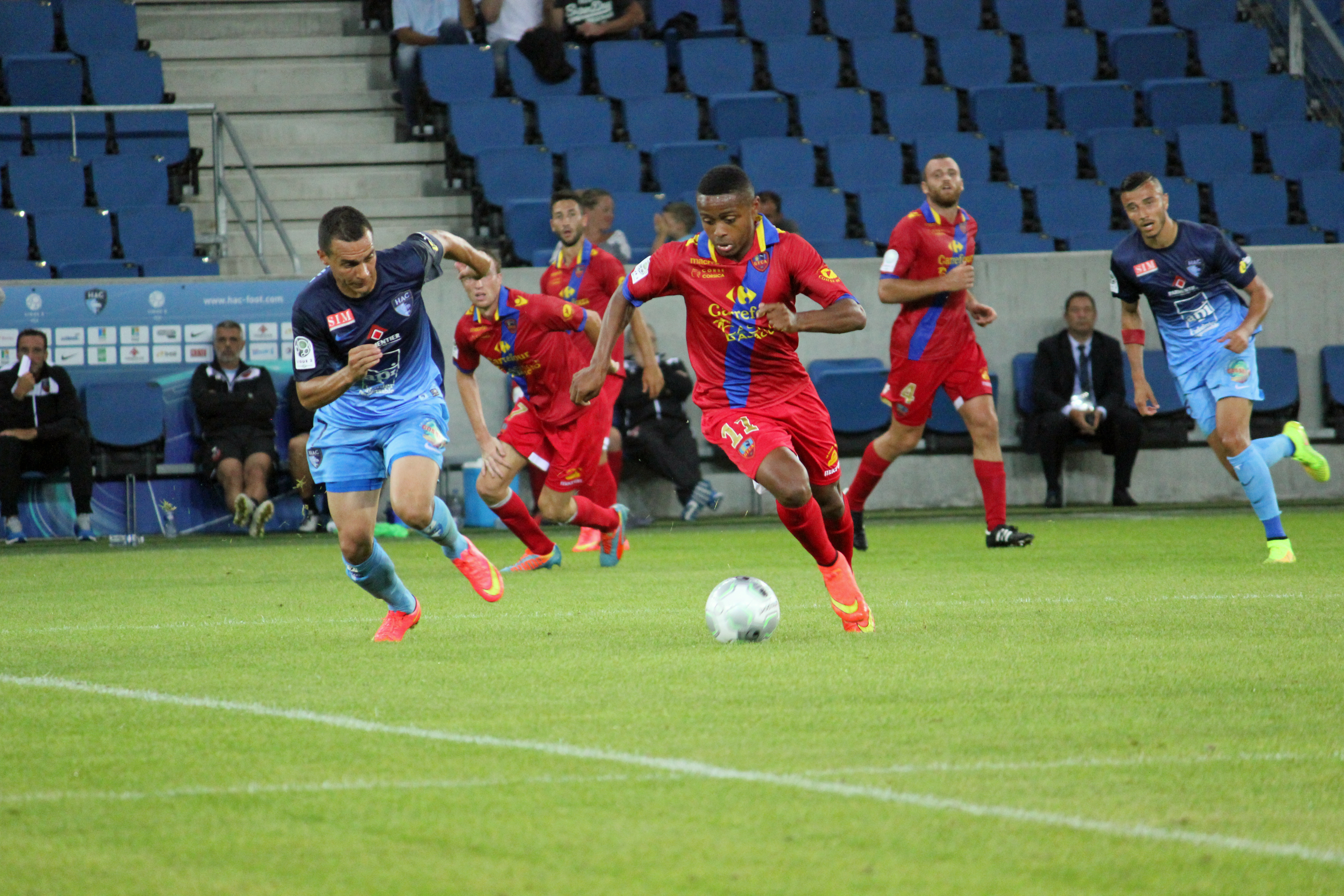 8 août 2014, deuxième journée du championnat de Ligue 2 française. Match : Le Havre - GFC Ajaccio